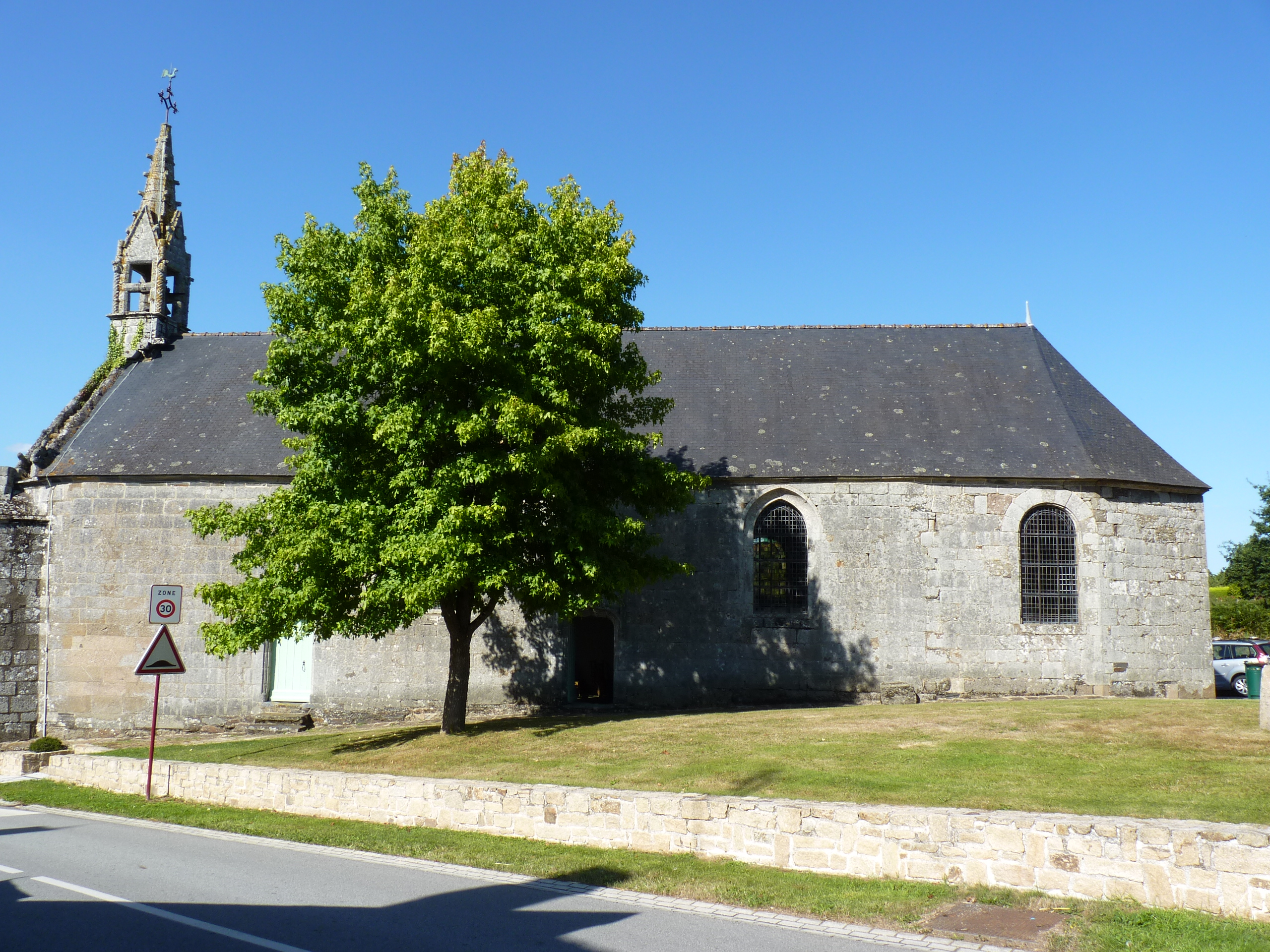 Chapelle du 16ème siècle agrandie au 18ème siècle.